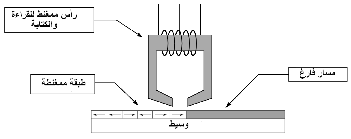 ترجمة لـ